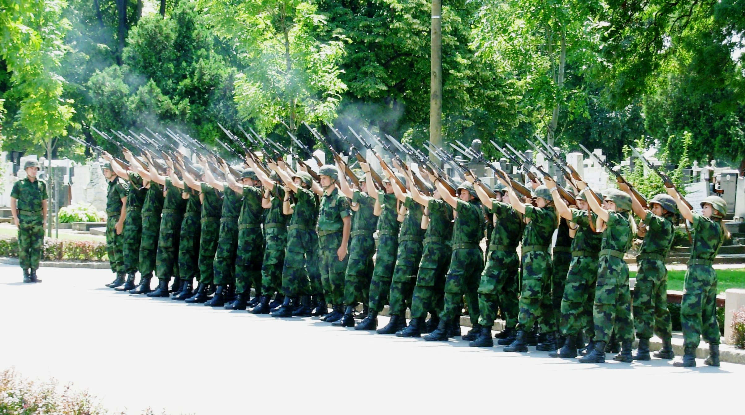 Почасни плотун - Војска Србије. Сликао Голдфингер